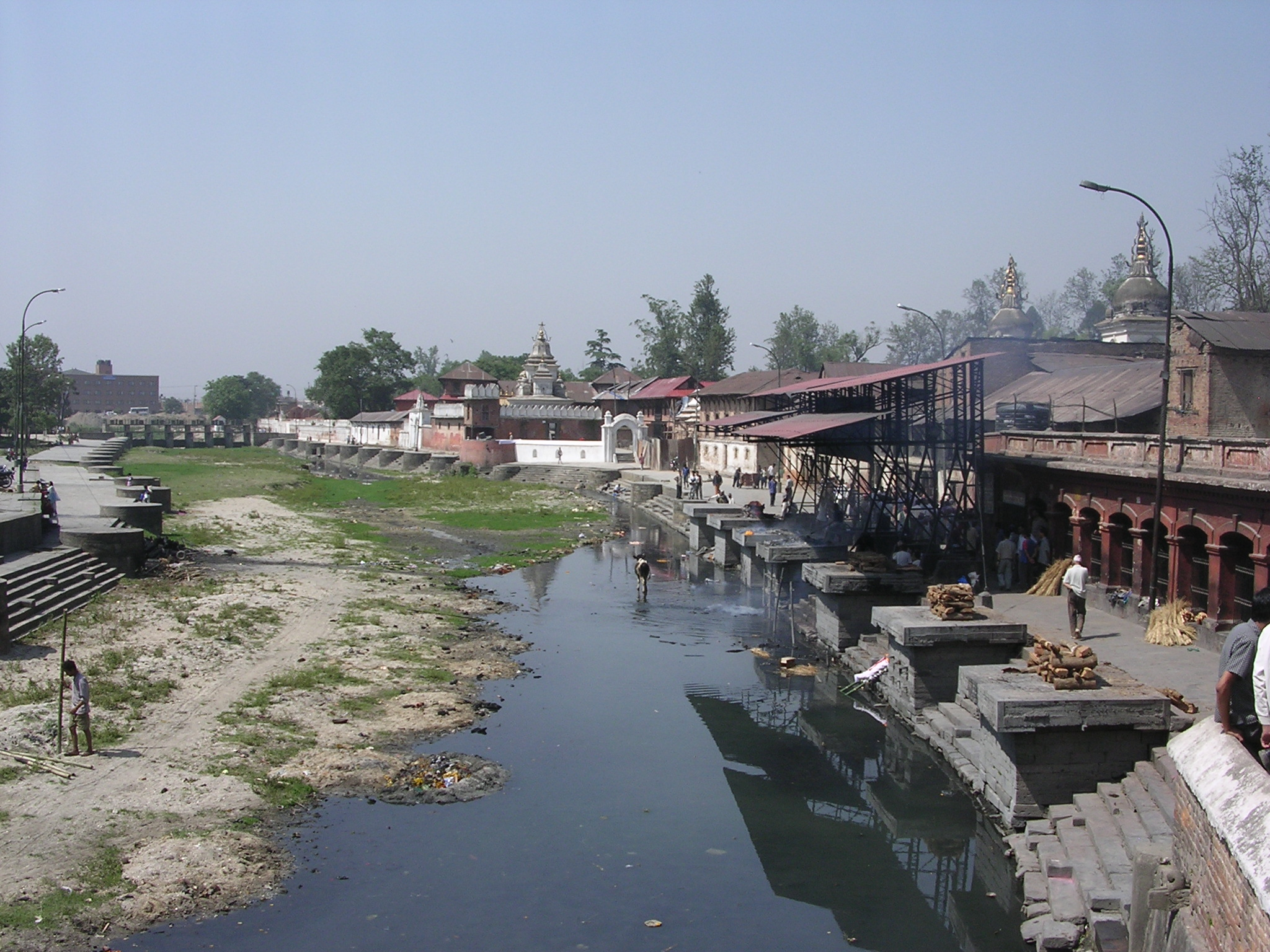 Photo By JoonYoung Kim on 29 May 2005